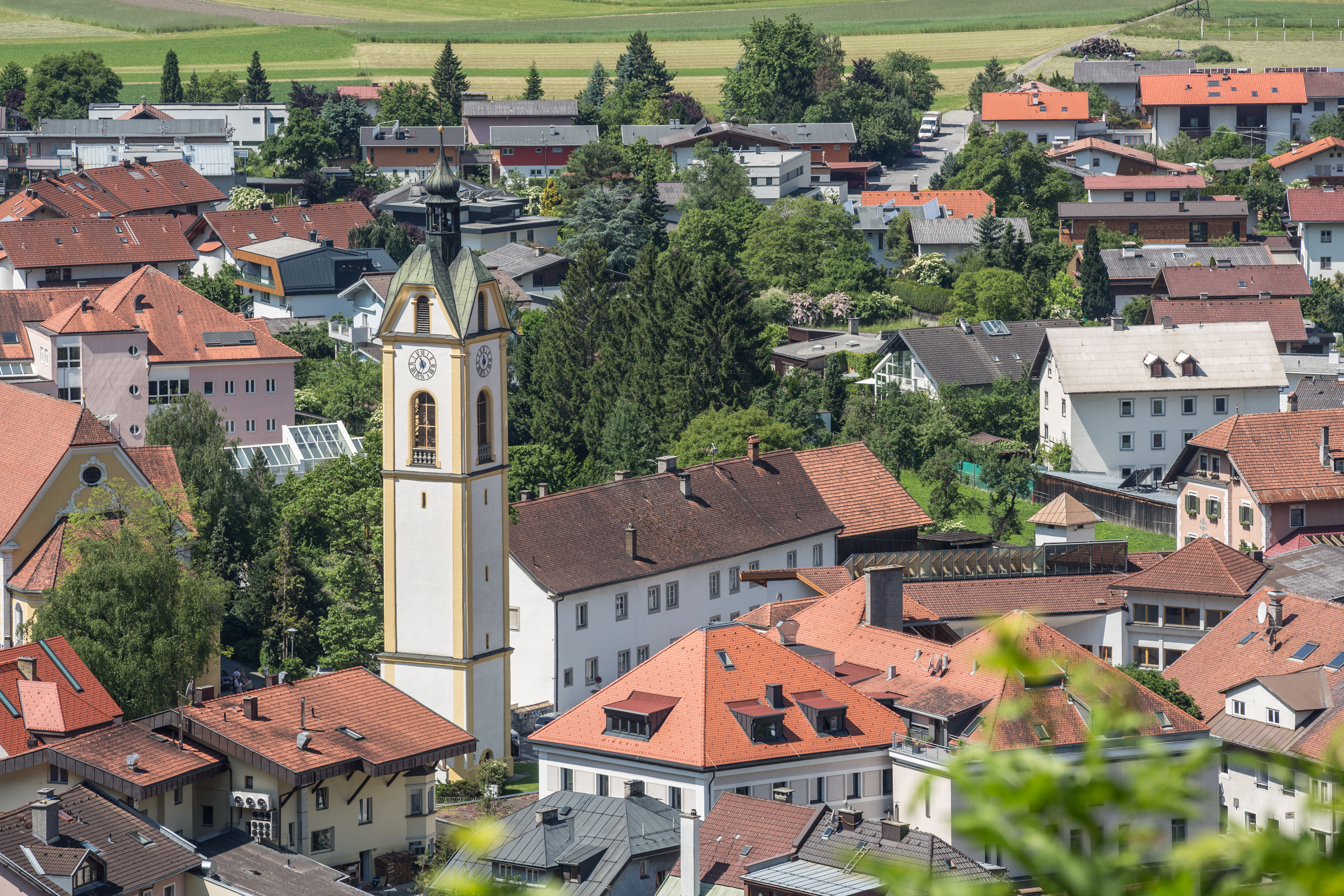 AT 65038 Panorama Zams, Kath. Pfarrkirche hl. Andreas mit freistehendem Turm